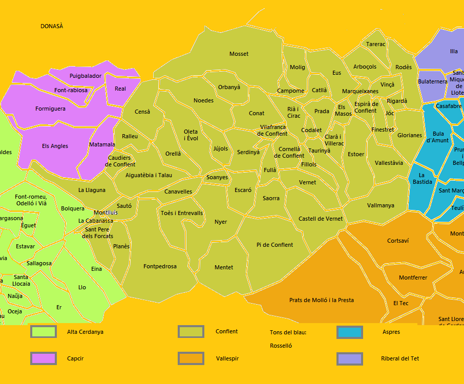 Mapa del Conflent elaborat a partir d'un mapa de lliure disposició